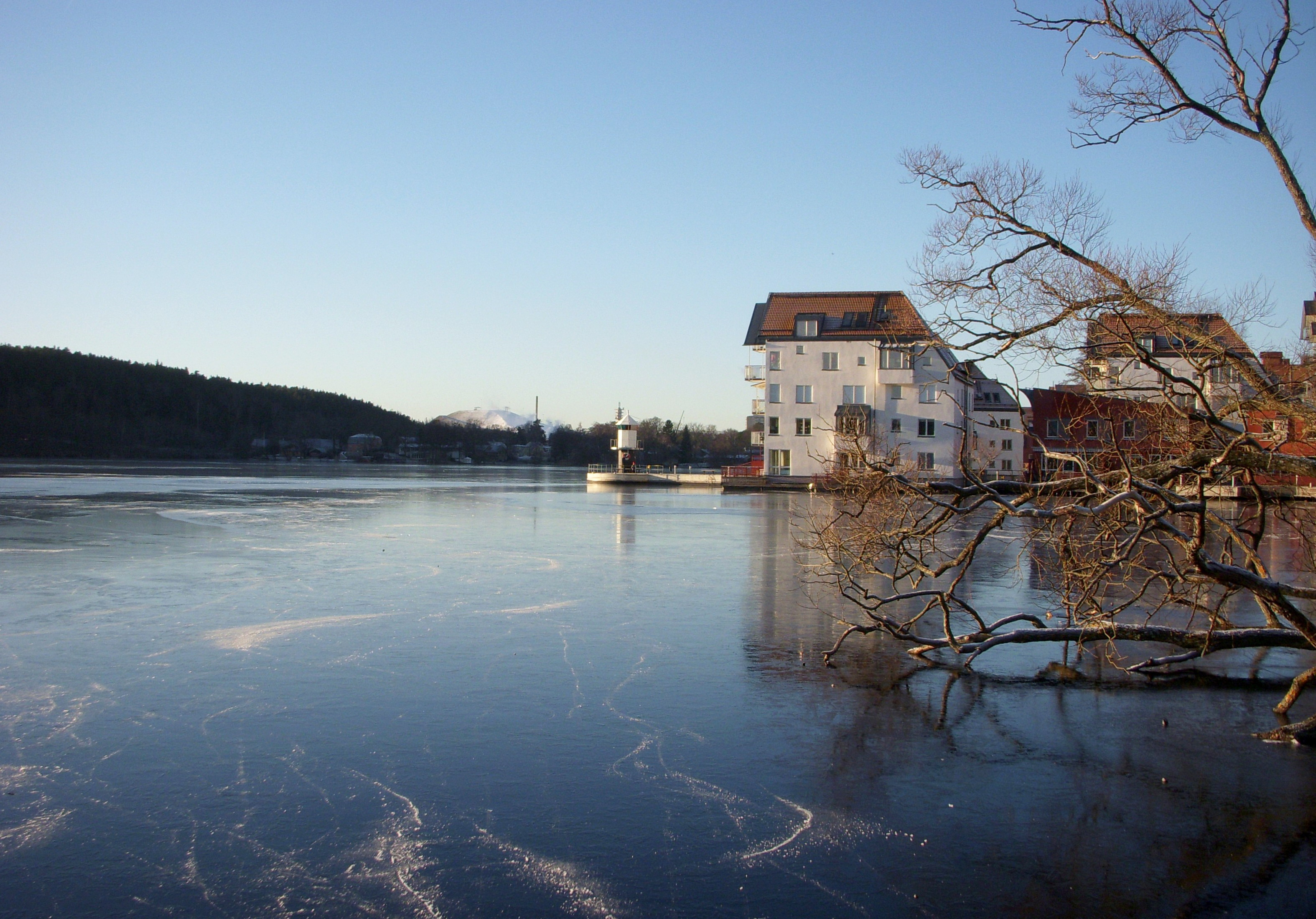 Järlasjön i Nacka